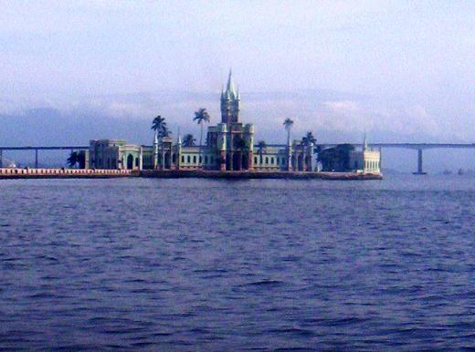 Picture of Ilha Fiscal in Rio de Janeiro, Brazil.